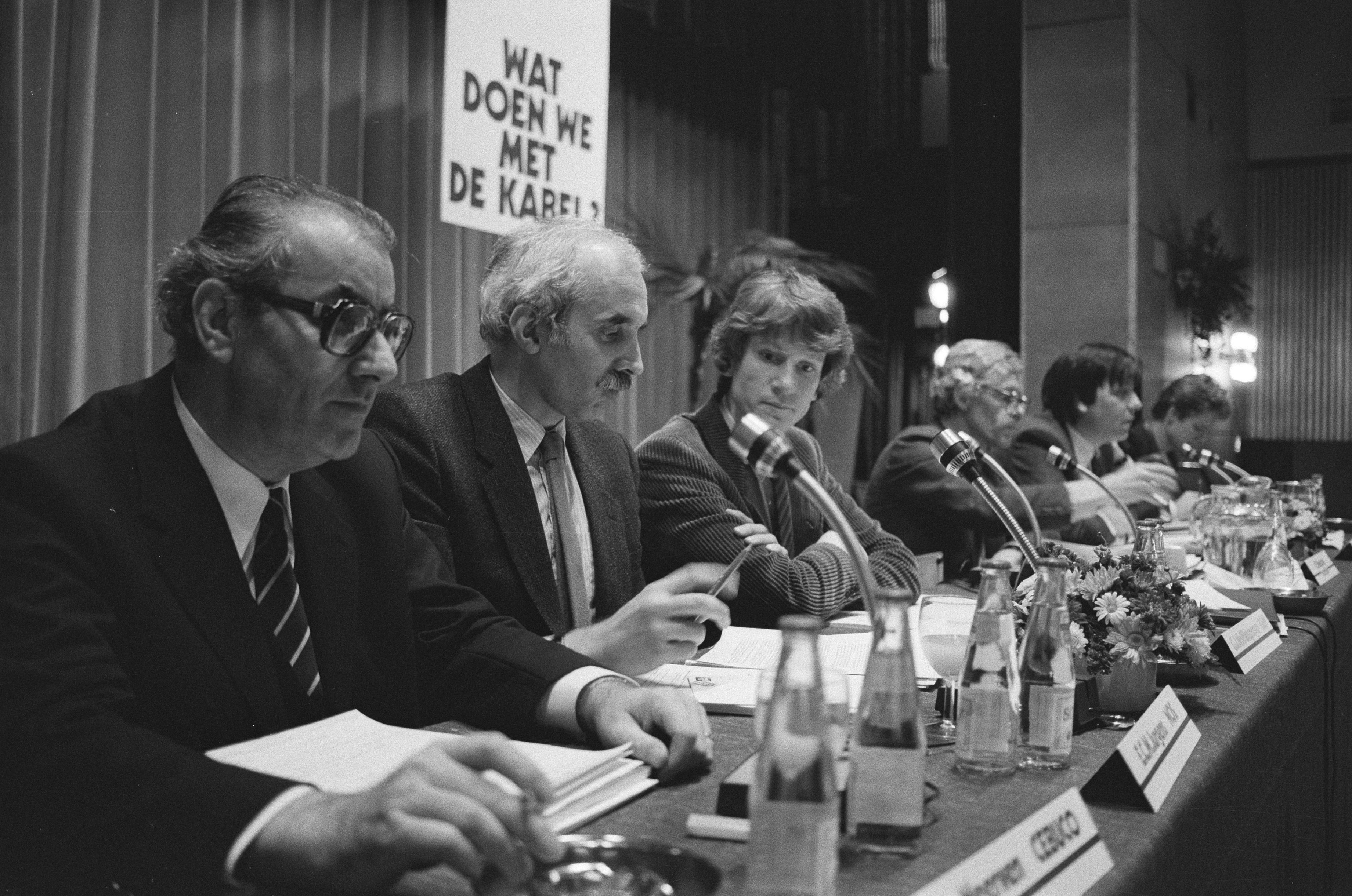 Collectie / Archief : Fotocollectie Anefo Reportage / Serie : Openbaar debat over de toekomst van lokale televisie in Amsterdam in Krasnapolsky Beschrijving : Van links naar rechts Jules van Neerven (directeur Cebuco), NOS-voorzitter Erik Jurgens (PPR), wethouder Wolffensperger (D66), Leo Spigt (voorzitter Radio Stad Amsterdam) en J.Verhoeven (ministerie CRM) tijdens het debat Datum : 19 november 1981 Locatie : Amsterdam, Noord-Holland Trefwoorden : lokale omroepen, televisie Persoonsnaam : Jurgens, Erik, Neerven, J.P.S. van, Spigt, Leo, Verhoeven, J., Wolffensperger, Gerrit Jan Fotograaf : Antonisse, Marcel / Anefo Auteursrechthebbende : Nationaal Archief Materiaalsoort : Negatief (zwart/wit) Nummer archiefinventaris : bekijk toegang 2.24.01.05 Bestanddeelnummer : 931-8123